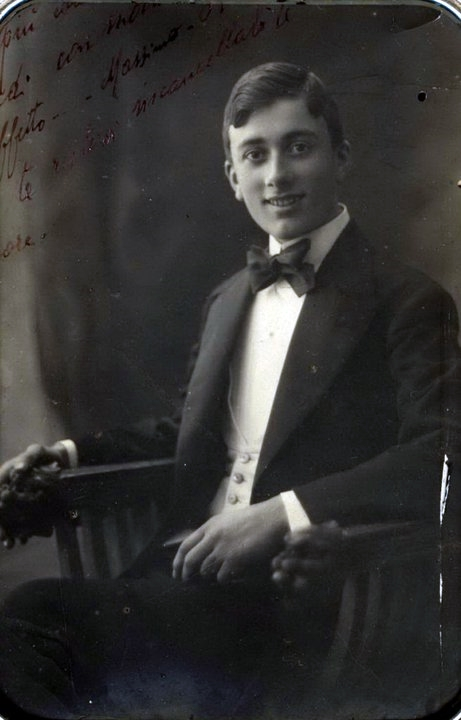 Foto di Massimo Pellicano ragazzo